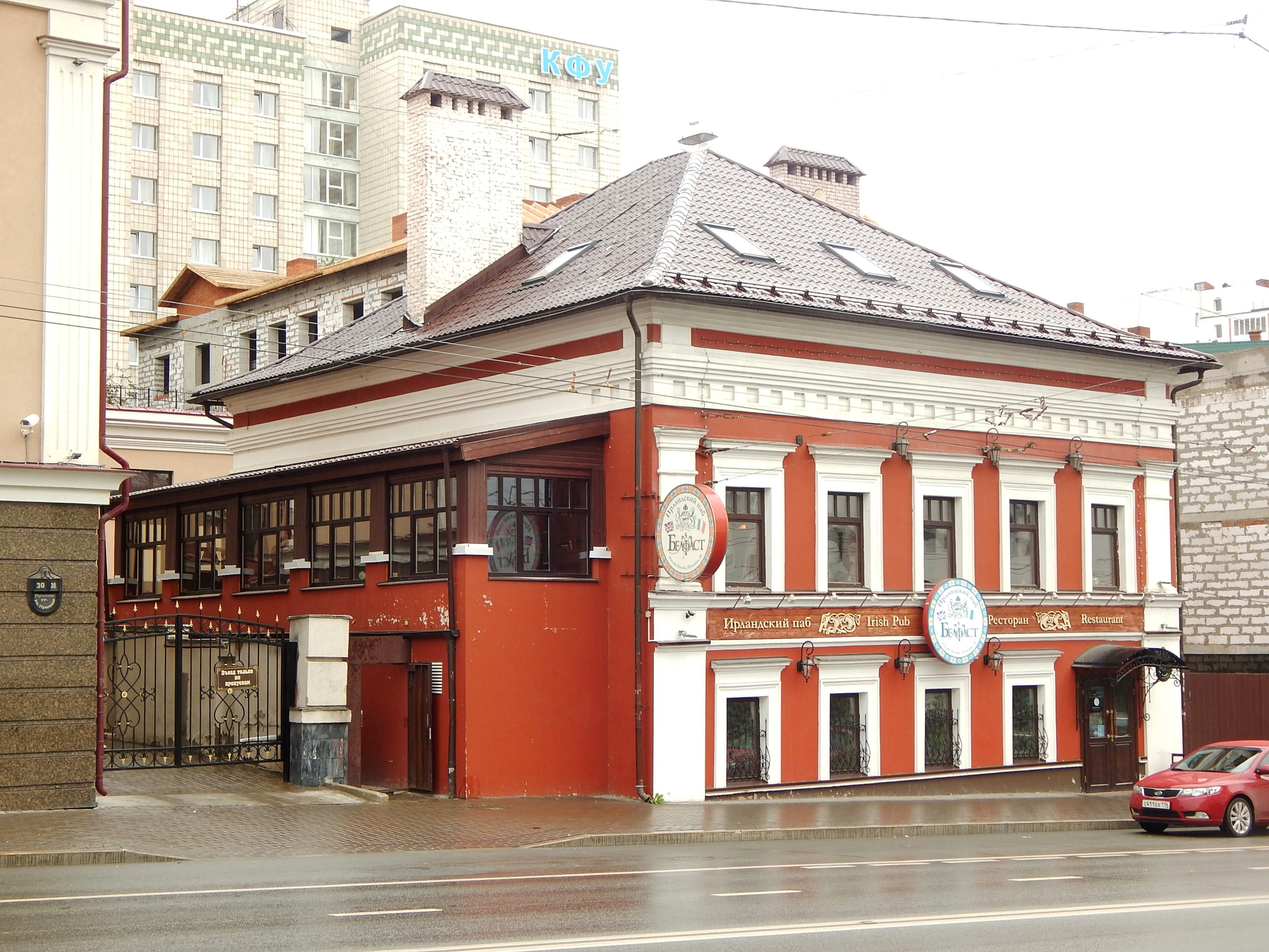 Дом, в котором жил С. Костриков (Киров): улица Куйбышева, 34, Казань, Татарстан